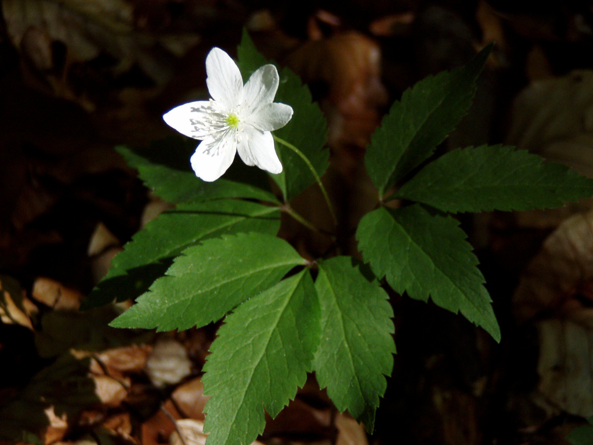 Dreiblatt-Windröschen in einem Buchenwald in Kärnten/ Anemone trifolia L. from a beech forest in Carinthia/Austria